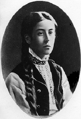 Vera Figner (1852-1942)